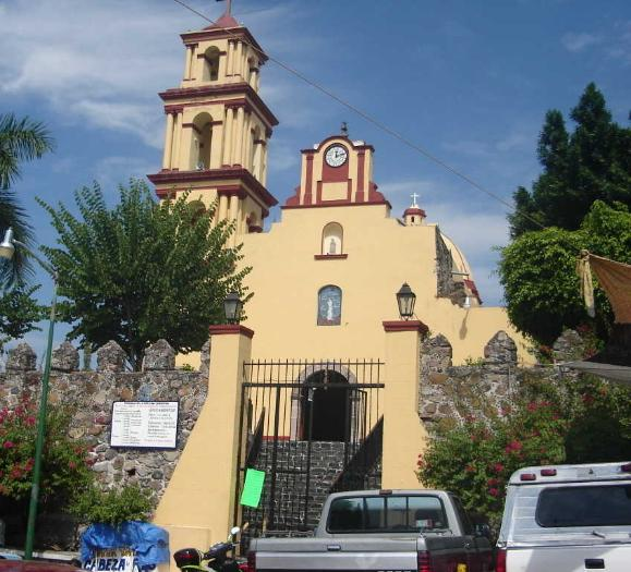 iglesia en Puente de Ixtla, Morelos, México